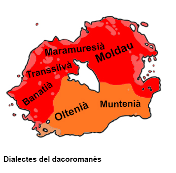 Dialectes del dacoromanès dividits en els blocs septentrional i meridional